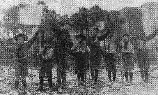 Víctor Fraiz Villanueva cos exploradores de Ponte Caldelas, fotografía en Vida Gallega 1915